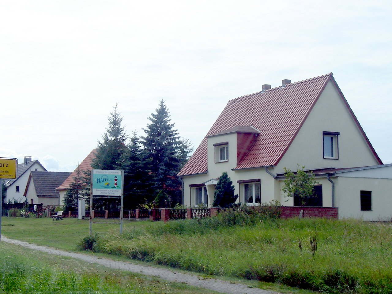 Budynek mieszkalny. Garz (Usedom).